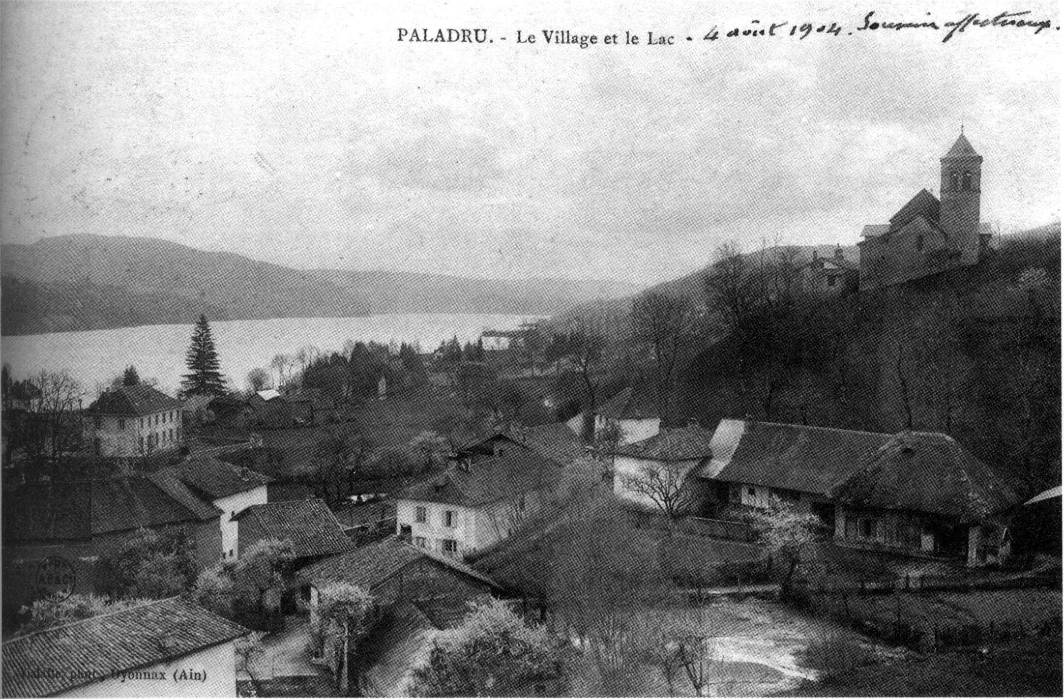 Paladru, le village et le lac, 1904